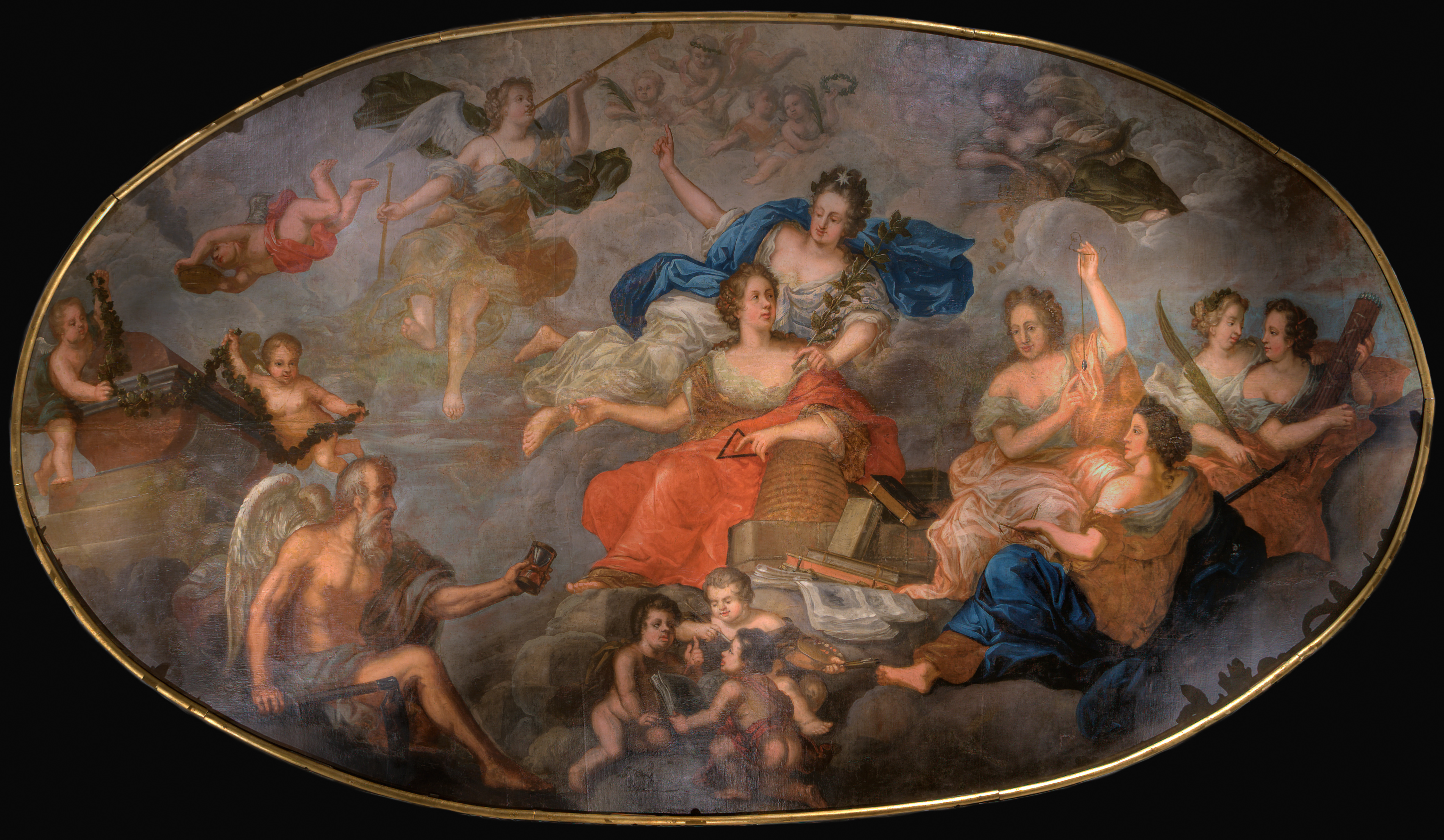 Deckengemälde des Festsaals aus dem Haus in der Katharinenstr. 9 in der Hamburger Altstadt. Dieses Gemälde wurde von Johann Moritz Riesenberger dem Jüngeren zwischen 1716 und 1720 erstellt. Fotografiert im Museum für Hamburgische Geschichte, Hamburg, Deutschland.